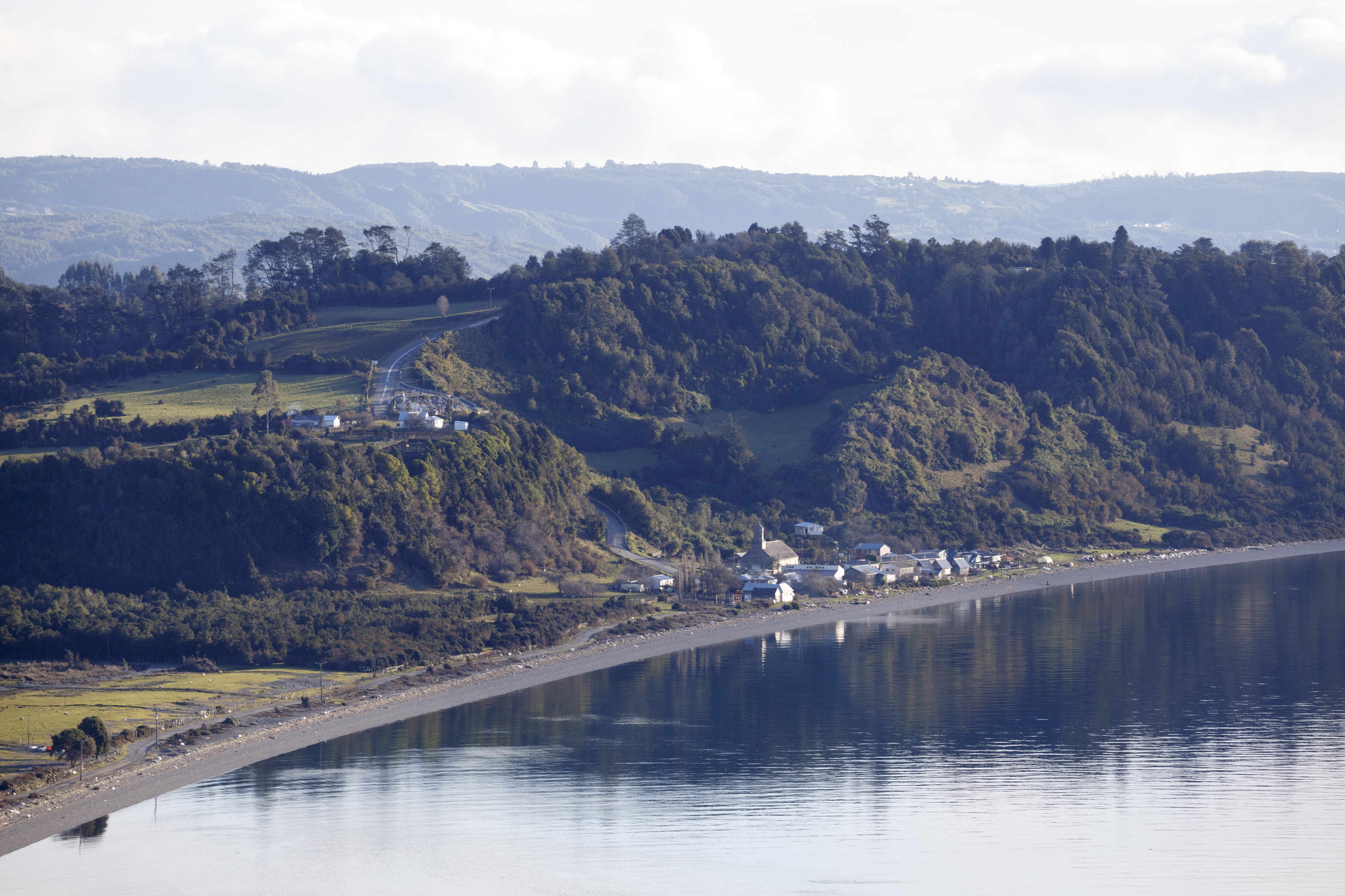 Caserío de Detif, desde sector Apahuén, isla Lemuy.